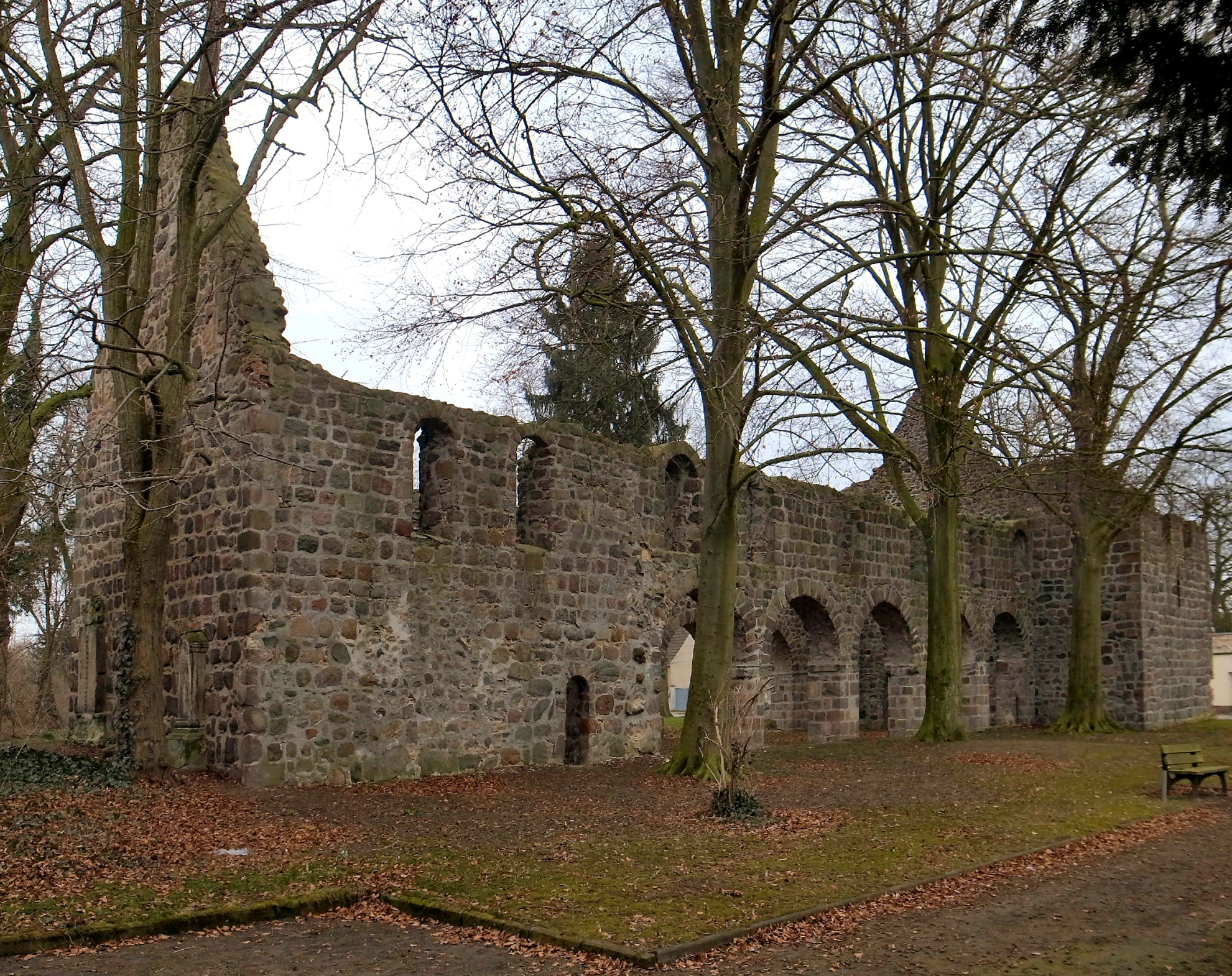 Loburg (Sachsen-Anhalt), Kirchenruine „Unser Lieben Frauen“, Feldsteinbau 13. Jahrhundert, dreischiffige Basilika, Objekt der Straße der Romanik (Quelle: Informationstafel an der Kirche)